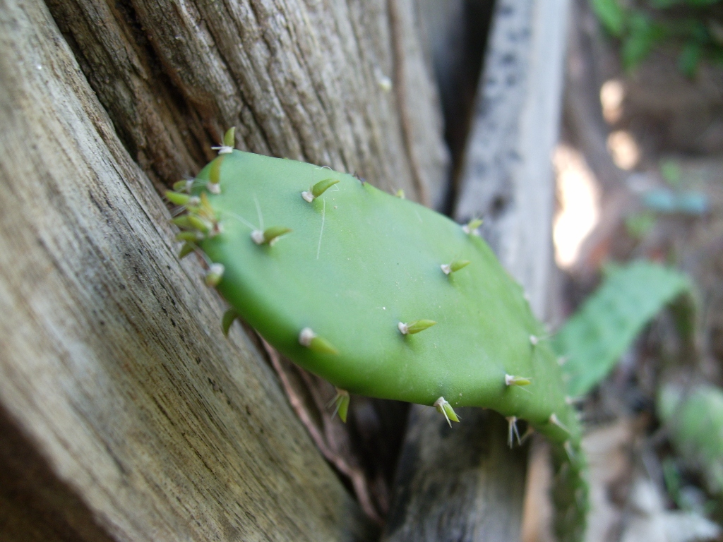 (Opuntia cochenillifera) Cacto, conhecido como Palma, junto a uma cerca de madeira. Fotografia feita no interior do Maranhão, cidade de Pedreiras.